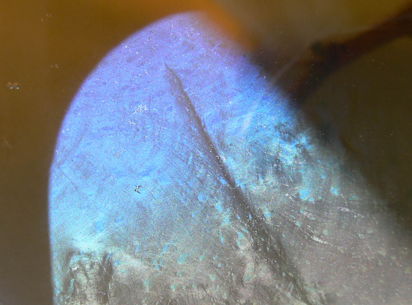 cultures d'infusoires sur eau stagnante, autrefois utilisées pour étudier les paramécies ou produire de la nourriture microscopique pour les alevins de poissons ou d'autres animaux consommateurs de paramécies. Le biofilm formé en surface est nettement visible, avec effets d'irisiation dûs à la polarisation de la lumière réfléchie. Ces biofilms sont parfois confondus avec une pollution par hydrocarbures, mais ils se cassent quand on les perce ou qu'on agite l'eau, et leur aspect est différent.